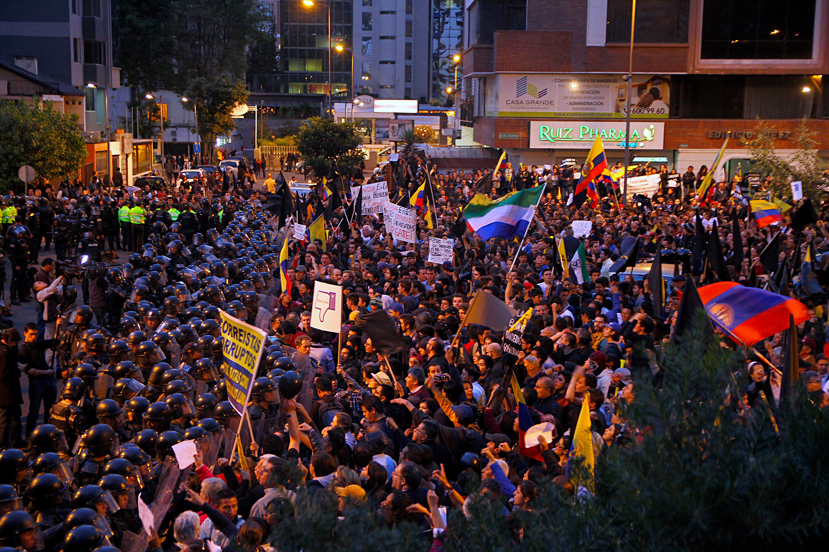 Plantón a favor y en contra del gobierno se suscita en la tribuna de la av. Shirys, frente a la sede de Alianza País.